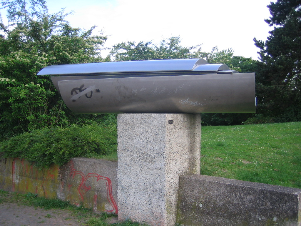 Skulptur von Erich Hauser auf dem öffentlichem Friedrichsplatz in Kassel, selbst aufgenommen von Armin Schönewolf 2005